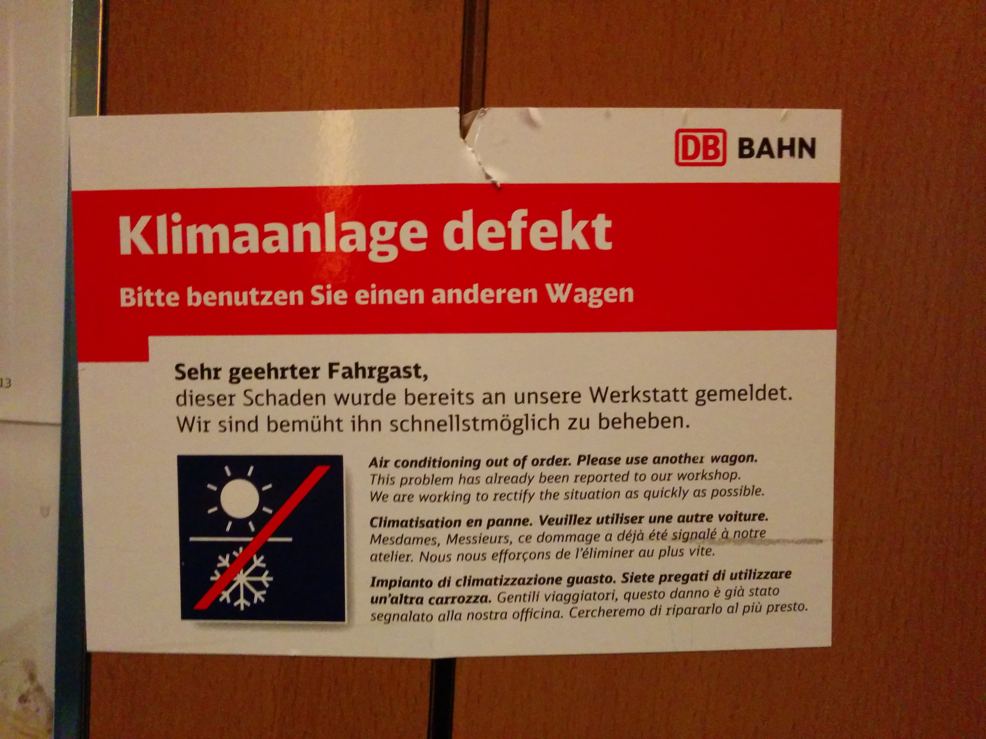 Hinweis-Aufkleber auf defekte Klimaanlage in einem ICE 3 der Deutschen Bahn